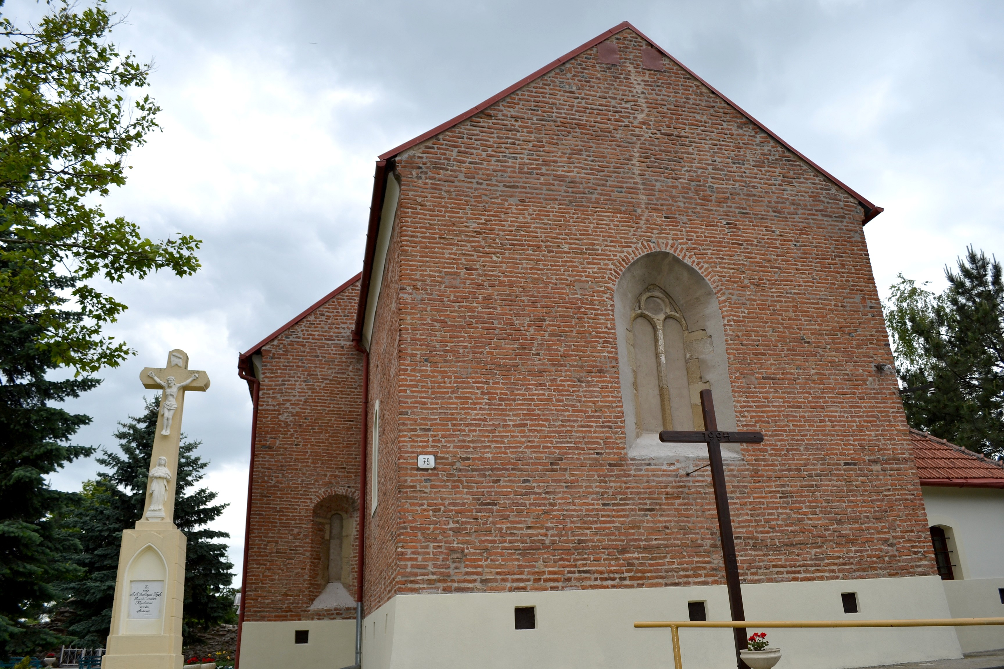 Kaplna, Kostol svätej Alžbety; záver presbytéria